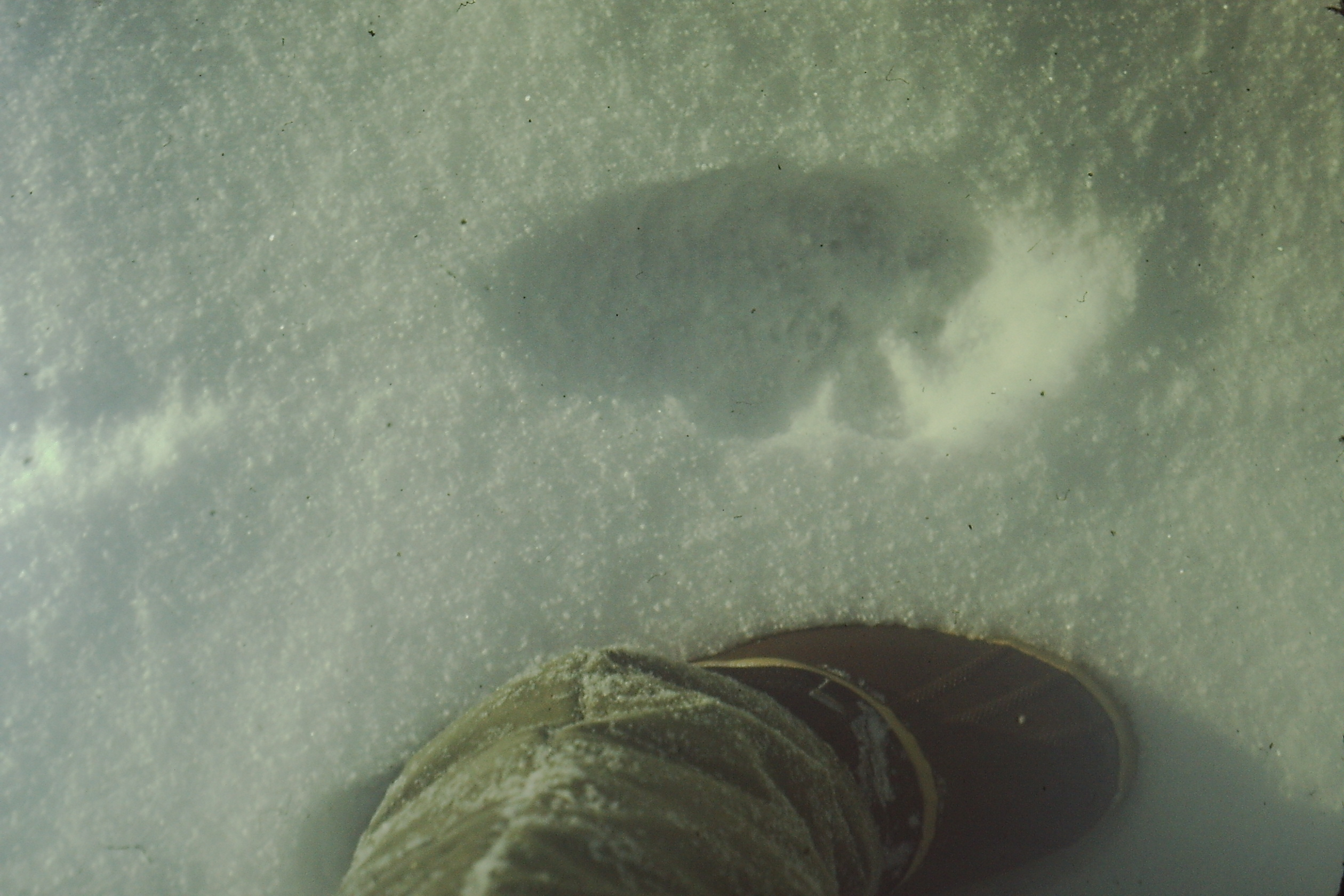 Brooks Range, Alaska. Luchsfährte.